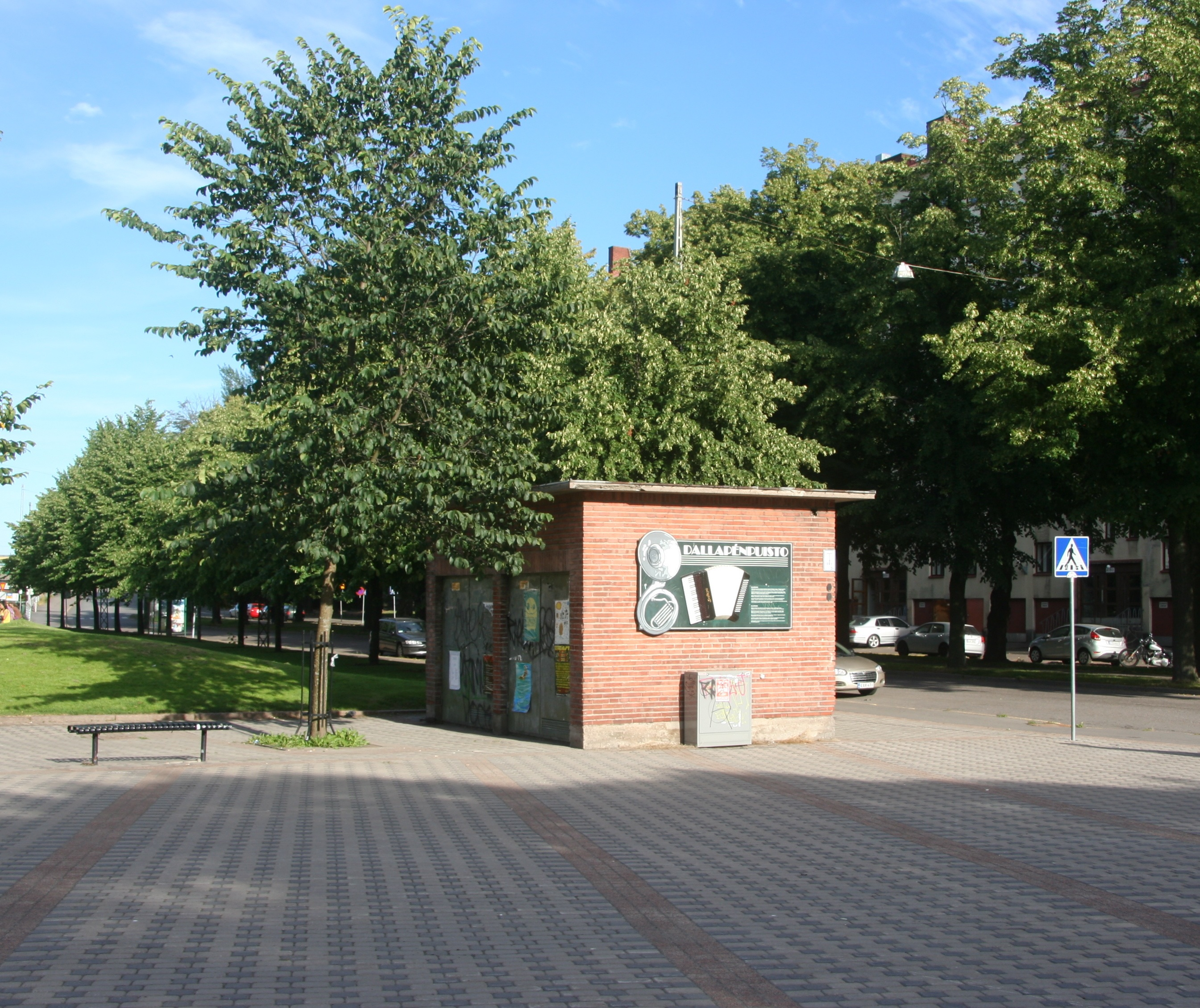 Dallapepuisto, Harju, Helsinki